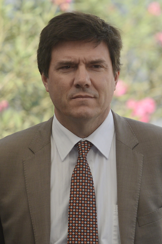 16 Abril 2015, Ministro Álvaro Elizalde se reúne con los miembros de ANATEL y el Ministro Andrés Gomez-Lobo.